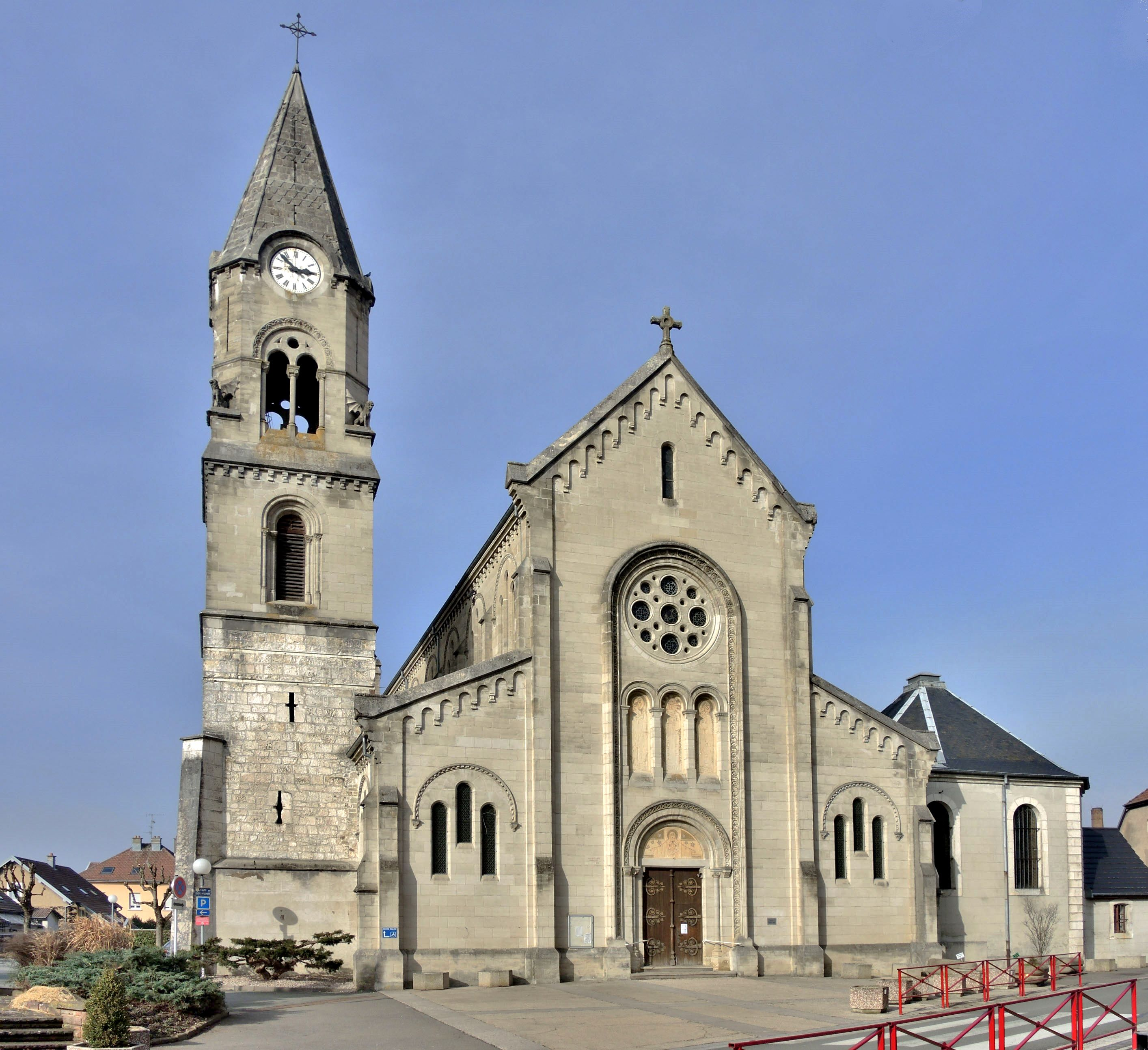 Eglise saint Just, de Danjoutin. Territoire de Belfort.